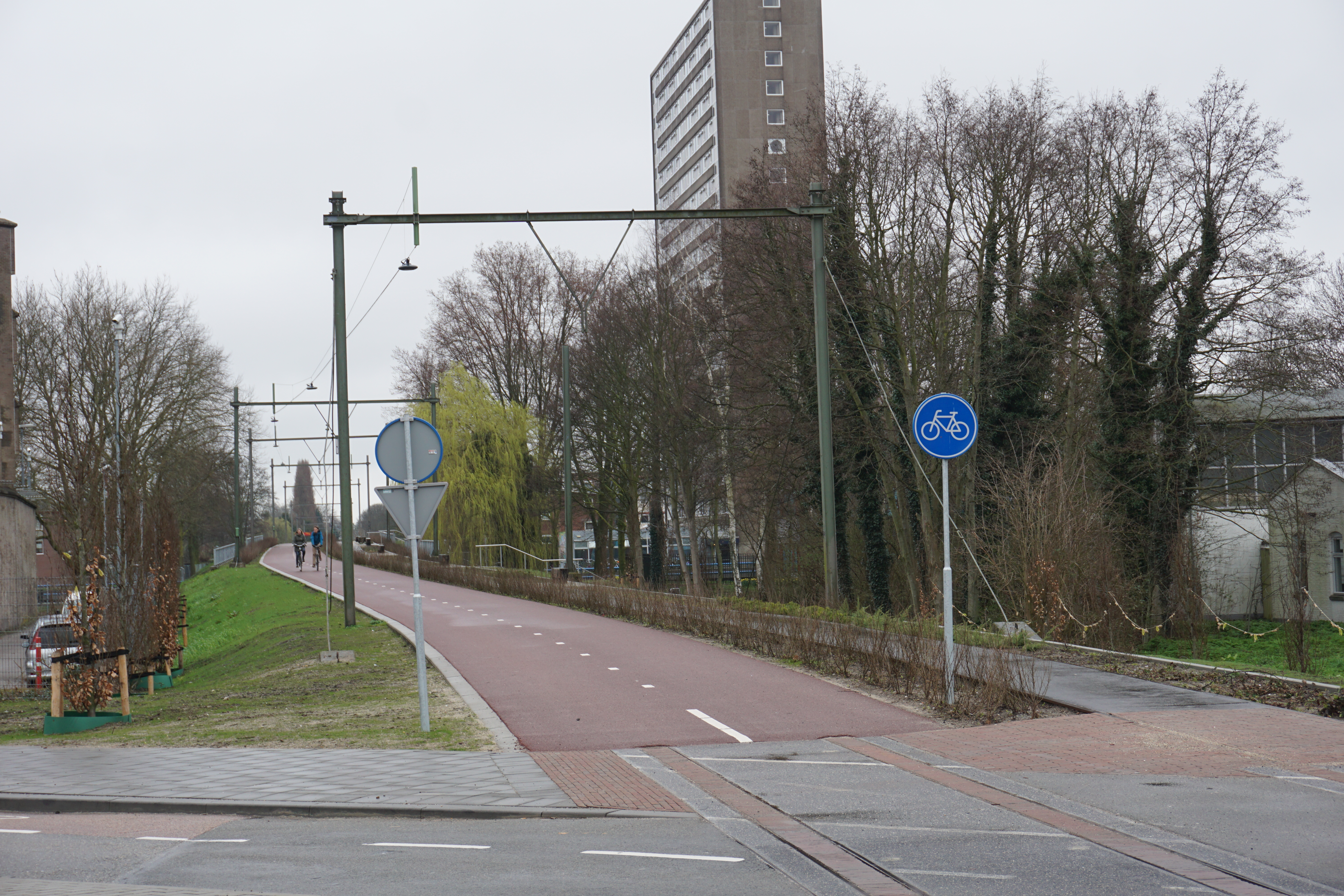 Een nieuwe bestemming voor een oud spoorbaanvak